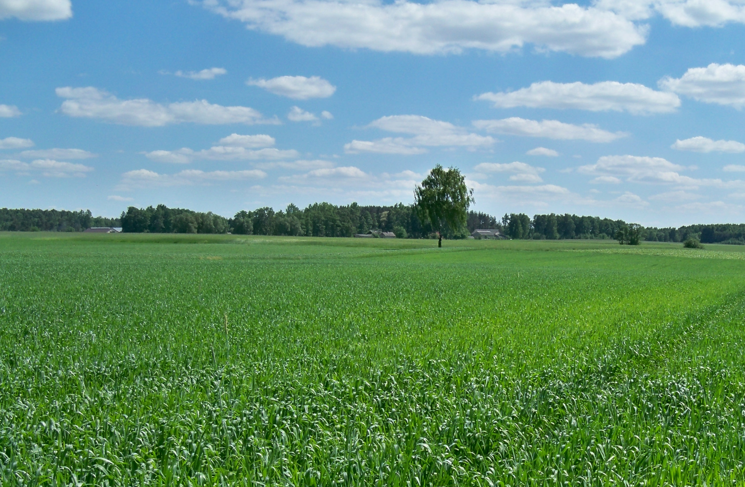 Narojki k. Drohiczyna. Widok z pól na południowo-zachodni przysiółek na granicy z Miłkowicami-Maćkami.